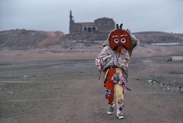 Documento visual a la descripción del artículo sobre el Zangarrón de Montamarta